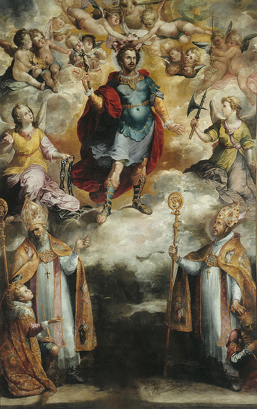 El lienzo representa la apoteósis del príncipe visigodo San Hermenegildo (564-585), que era hijo del rey Leovigildo y de su primera mujer y hermano del rey Recaredo. Fue educado en el arrianismo imperante entre los visigodos de la Península en ese entonces (a diferencia de los hispanorromanos, que eran mayoritariamente católicos). Su conversión al catolicismo lo enfrentó con su padre y provocó una contienda militar, que acabaría con su captura y muerte. Fue canonizado en 1585 como mártir de la Iglesia Católica; es patrono de los conversos y su festividad se celebra el aniversario de su muerte, el 13 de abril. Herrera el viejo se formó dentro del espíritu manierista que pintores como Pacheco habían impuesto, pero progresivamente fue abandonando esta orientación inicial para integrarse decididamente en la corriente naturalista. El museo conserva alguna de sus mejores obras como La Apoteósis de San Hermenegildo. La escena está dividida en los dos registros: el celestial y el terrenal. En el rompimiento de gloria aparece San Hermenegildo triunfante rodeado de ángeles. En la zona de Tierra, San Isidoro somete a Leovigildo y San Leandro protege a Recadero, el futuro rey que proclamaría el catolicismo de España en el Tercer Concilio de Toledo. El lienzo muestra las características de la madurez de su estilo con pinceladas enérgicas y sueltas que modelan rostros de acentuada individualidad y una gama de color en la que predominan los castaños dorados y negros.